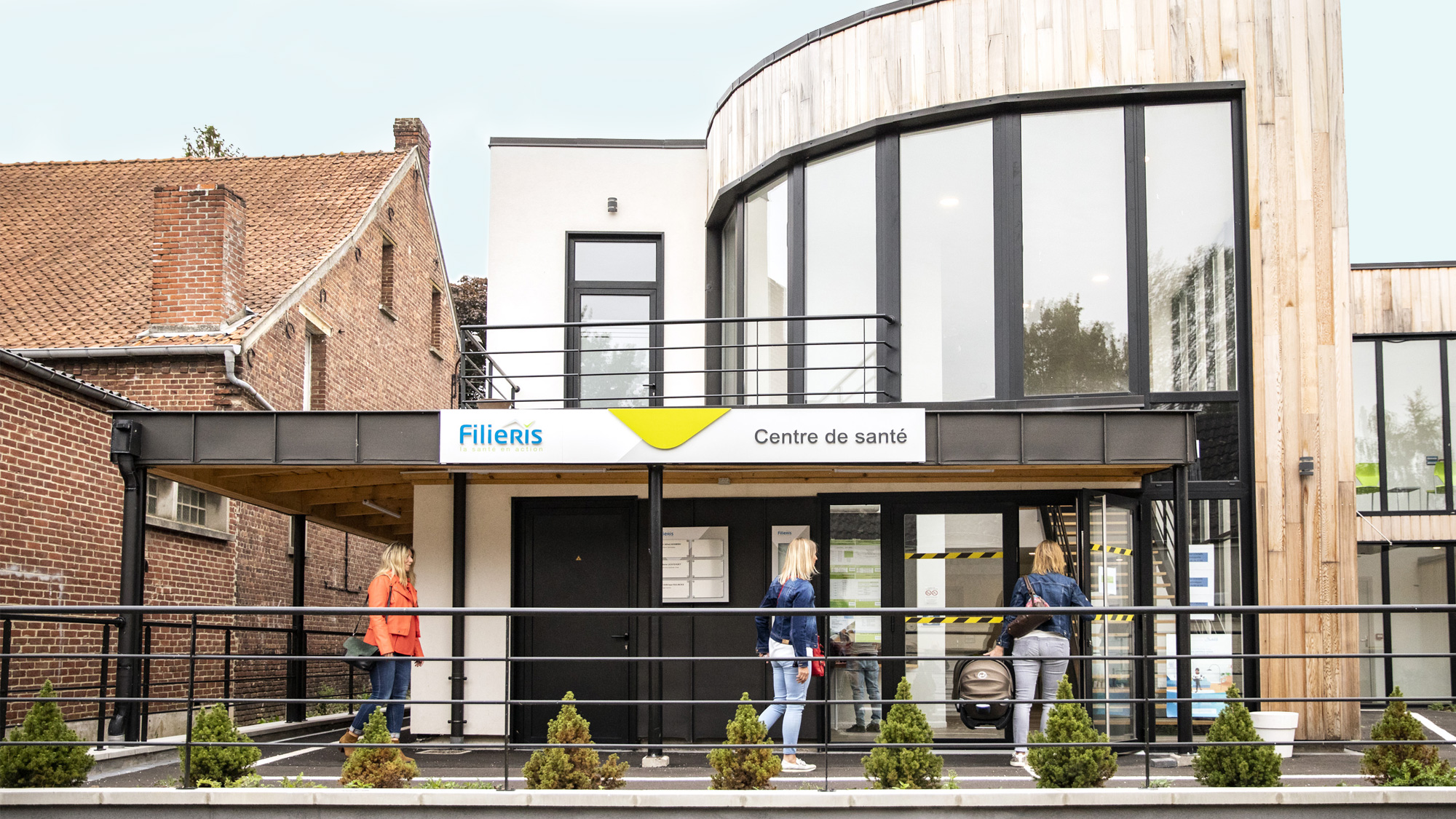 Devanture du centre de santé Filieris de Lapugnoy (Pas-de-Calais) ouvert en février 2019.